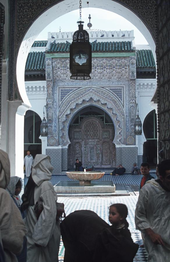 Fes: Moschee El Kairouine, Innenhof